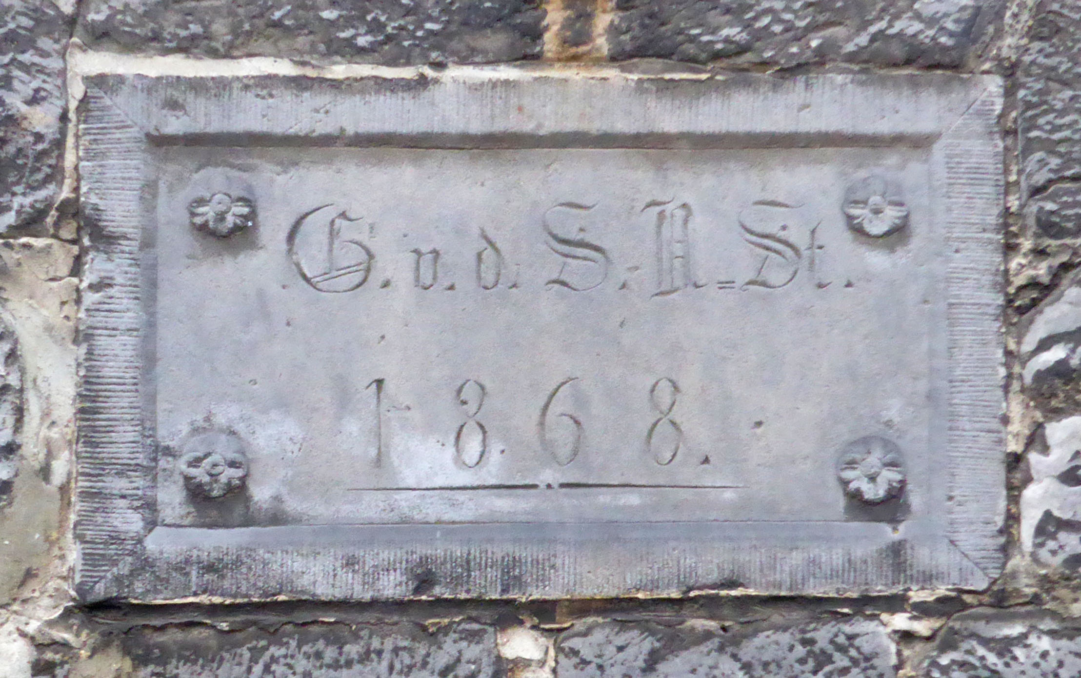 Tafel am Margarethenhof in Reislingen mit den Initialen von Gebhard von der Schulenburg (1823–1897).